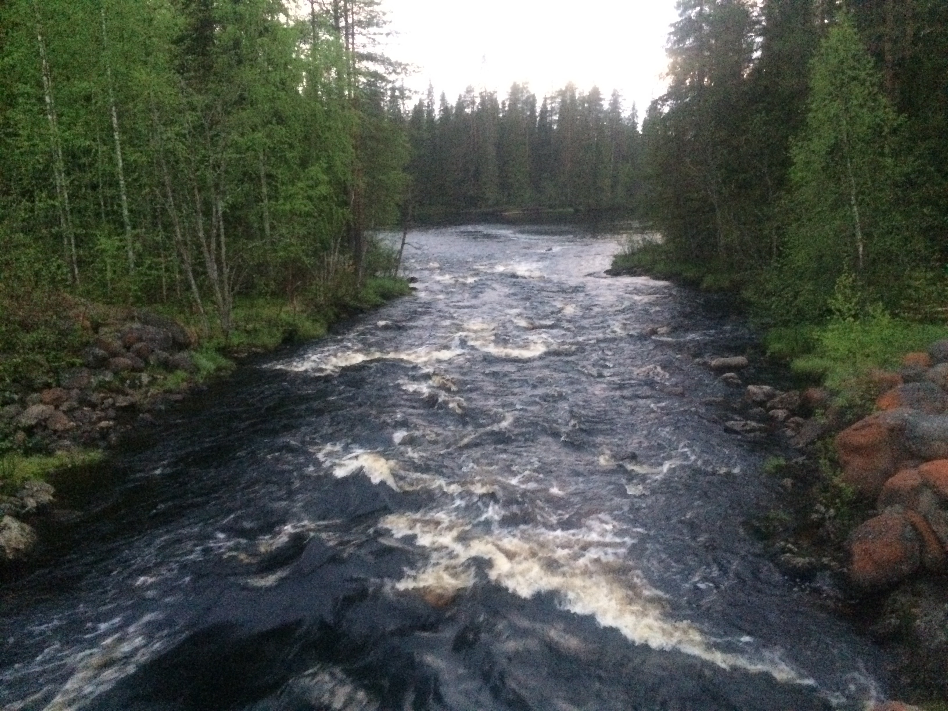 Пенинга (река)